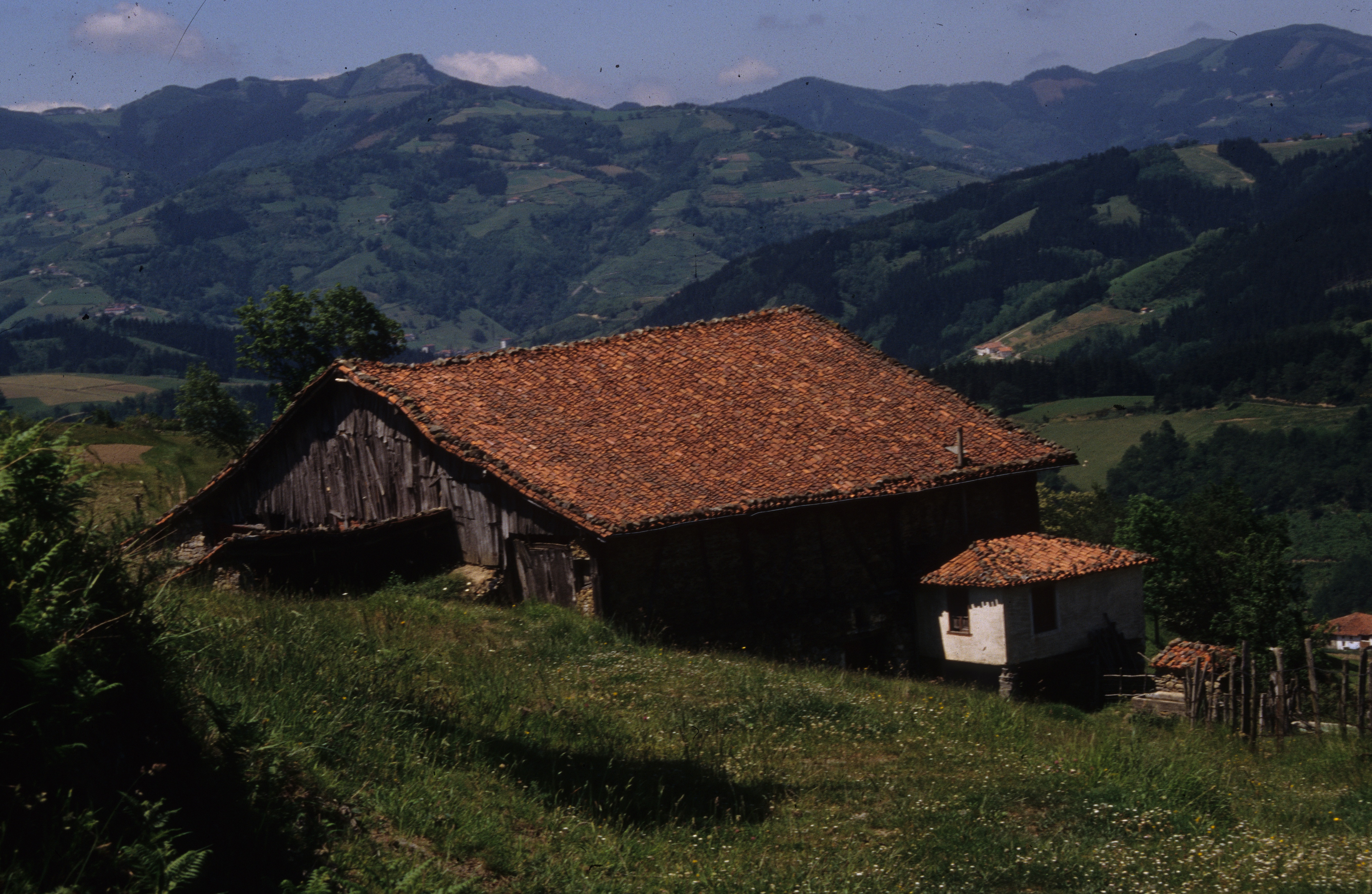 Zaldibiako Iparragirre baserria.